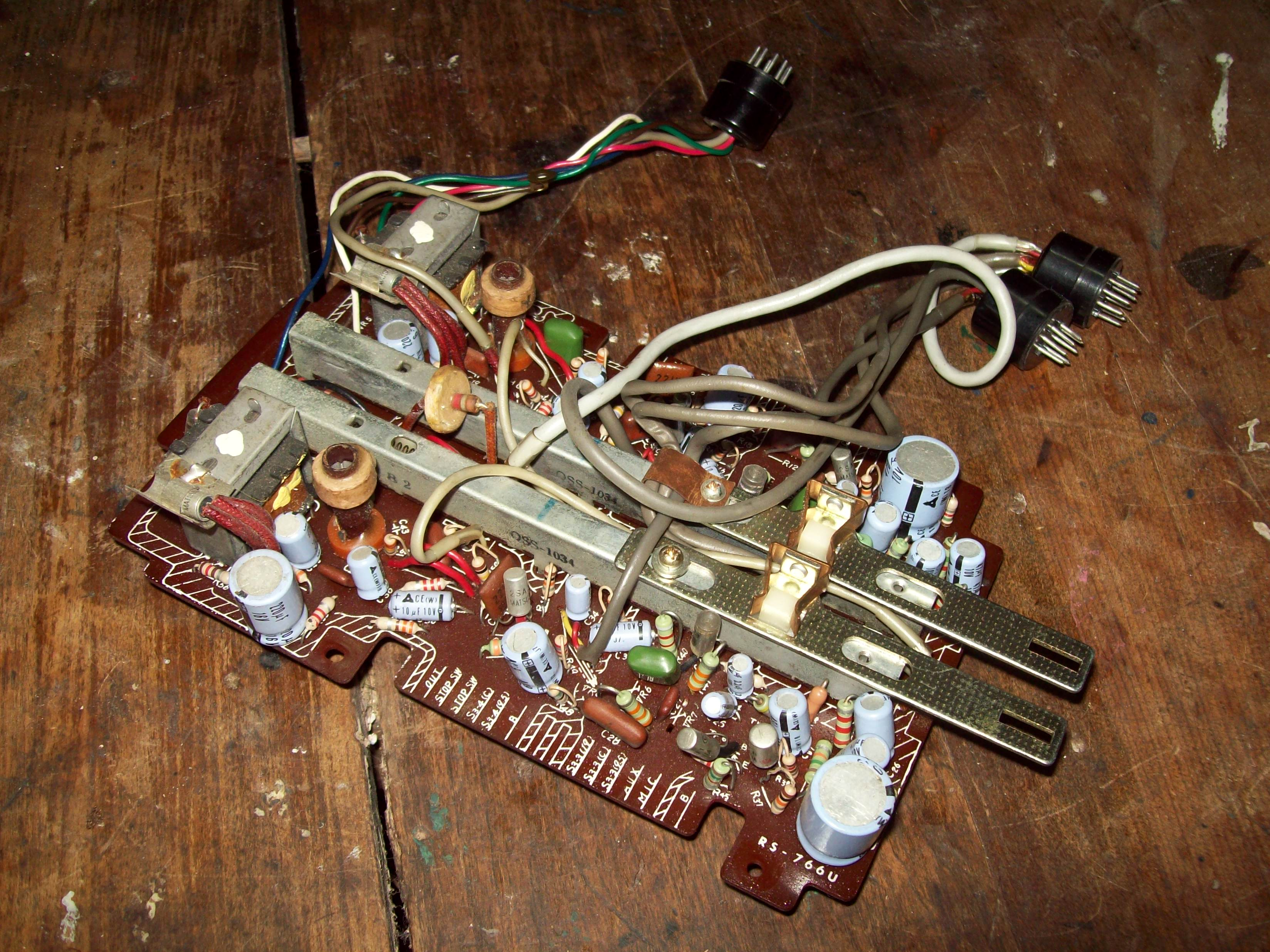 Unidad electrónica de magnetofon de cinta abierta marca Ken Brown japones.